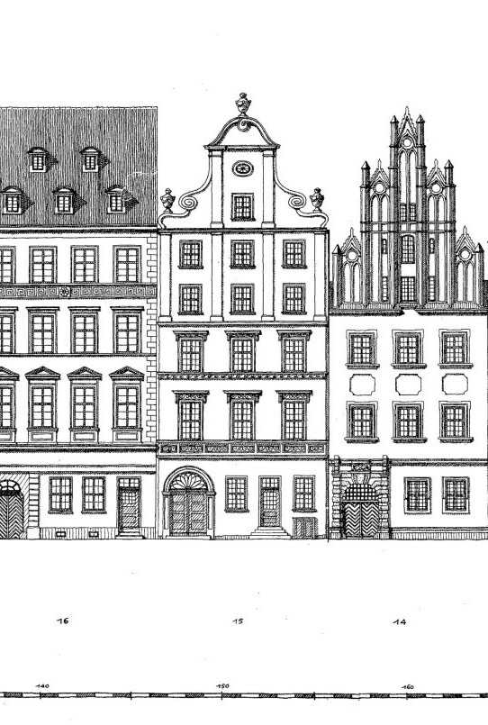 Rekonstrukcja wyglądu południowej strony Rynku we Wrocławiu z ok. 1800 roku. Rysunek Rudolfa Steina z lat 1929-30 (fragment)